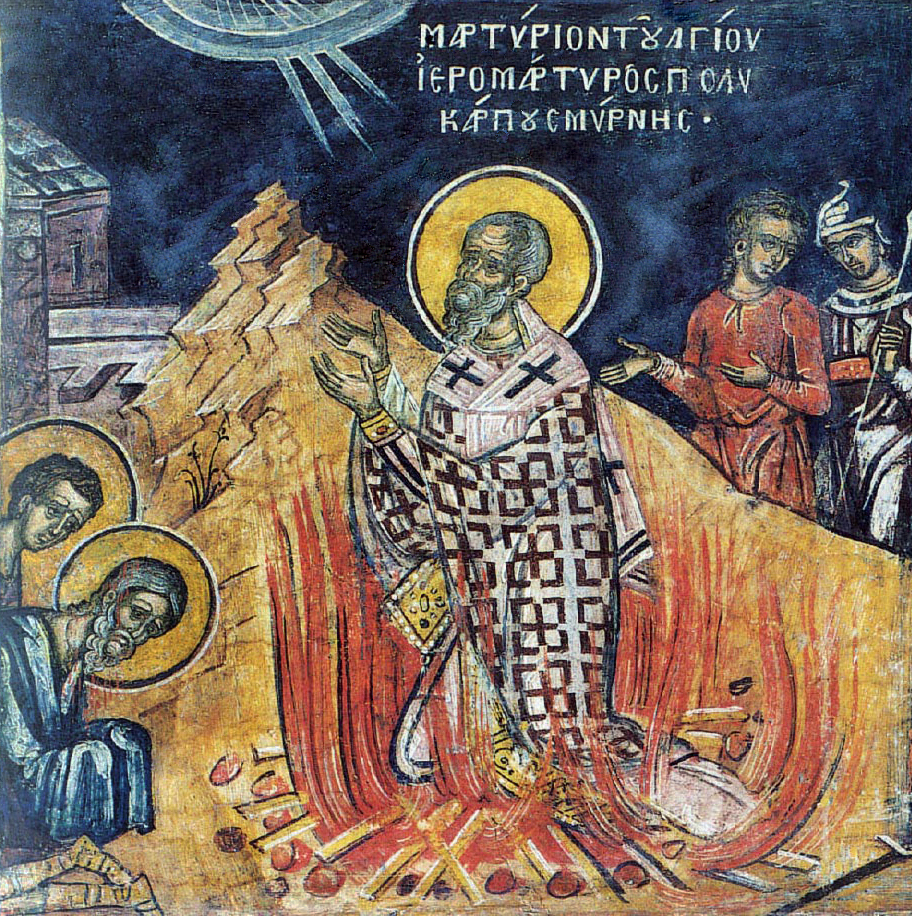 Détail d'une fresque du monastère de Dionysiou au Mont Athos.